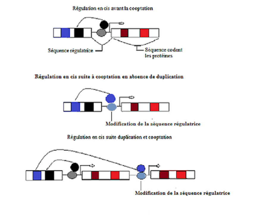 Activation de gènes suite à cooptation résultant dans la modification de la séquence régulatrice